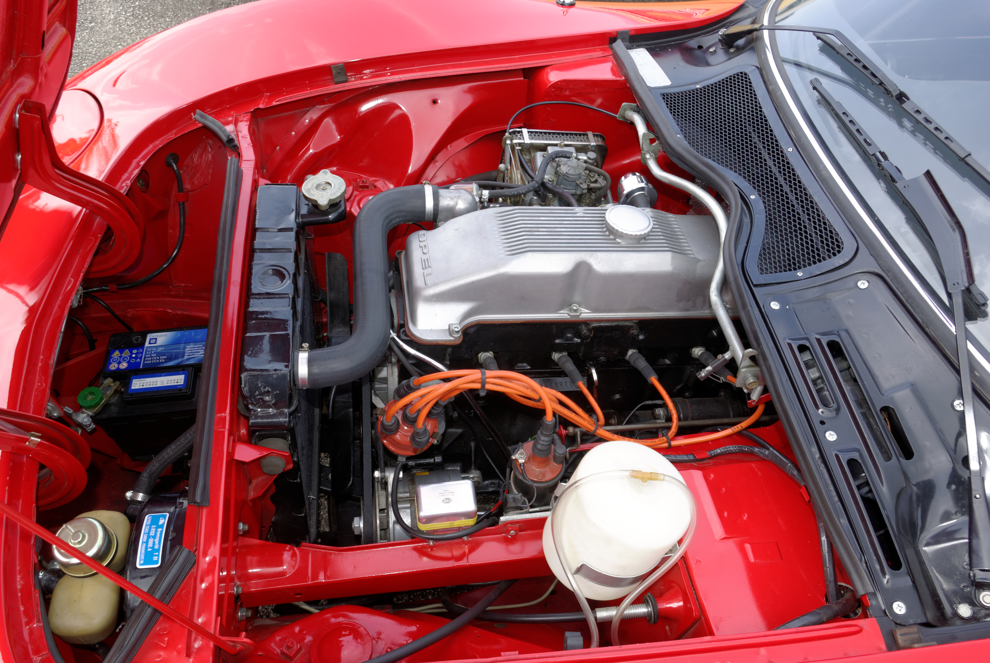 Opel GT Bitburg Classic 2014